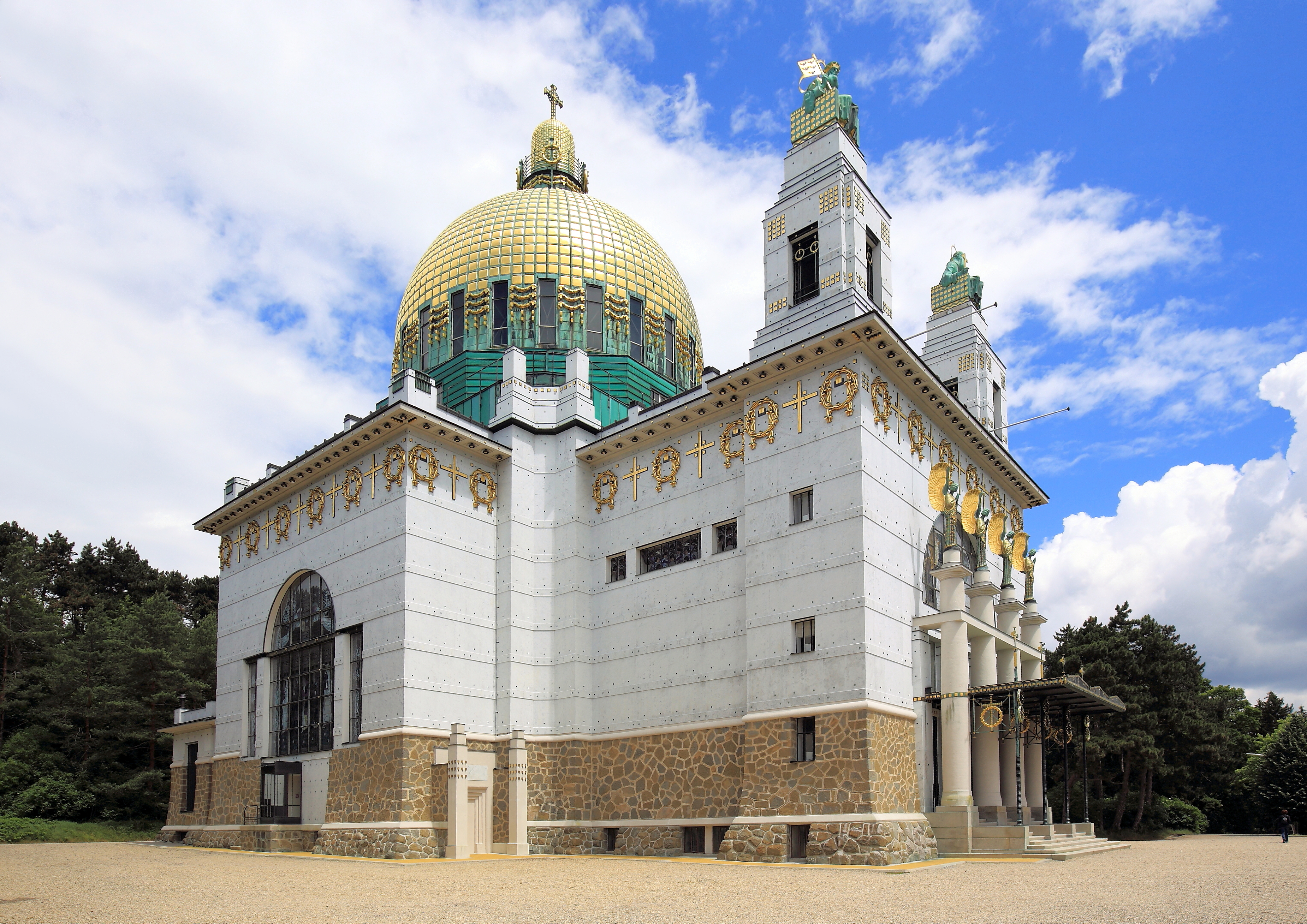 Südwestansicht der Kirche am Steinhof, auch Leopoldskirche bezeichnet, auf dem Gelände des Sozialmedizinischen Zentrums Baumgartner Höhe bzw. Otto-Wagner-Spitals im 14. Wiener Gemeindebezirk Penzing. Die Kirche wurde von 1904 bis 1907 über dem traditionellen Grundriss eines griechischen Kreuzes nach Plänen des Architekten Otto Wagner als Anstaltskirche errichtet. Sie ist der bedeutendste Sakralbau der Wiener Moderne in Wien.